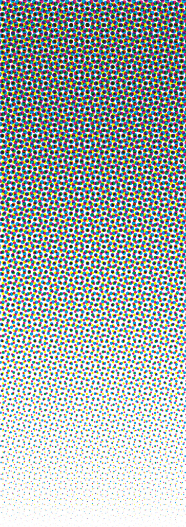 dreifarbiger Zusammendruck Gelb, Cyan und Magenta